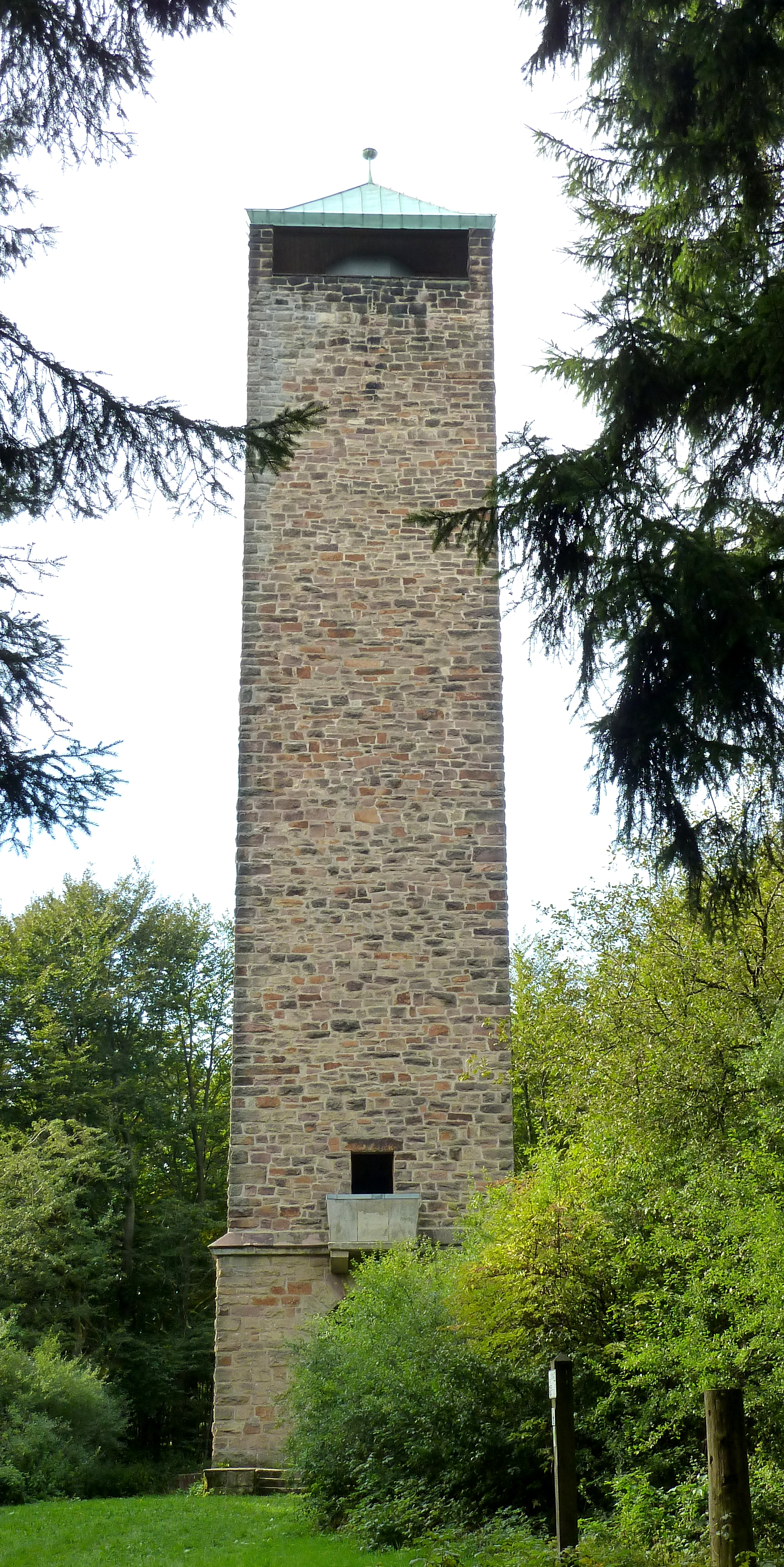 Sollingturm auf dem Strutberg nordnordwestlich von Uslar, errichtet 1934/35